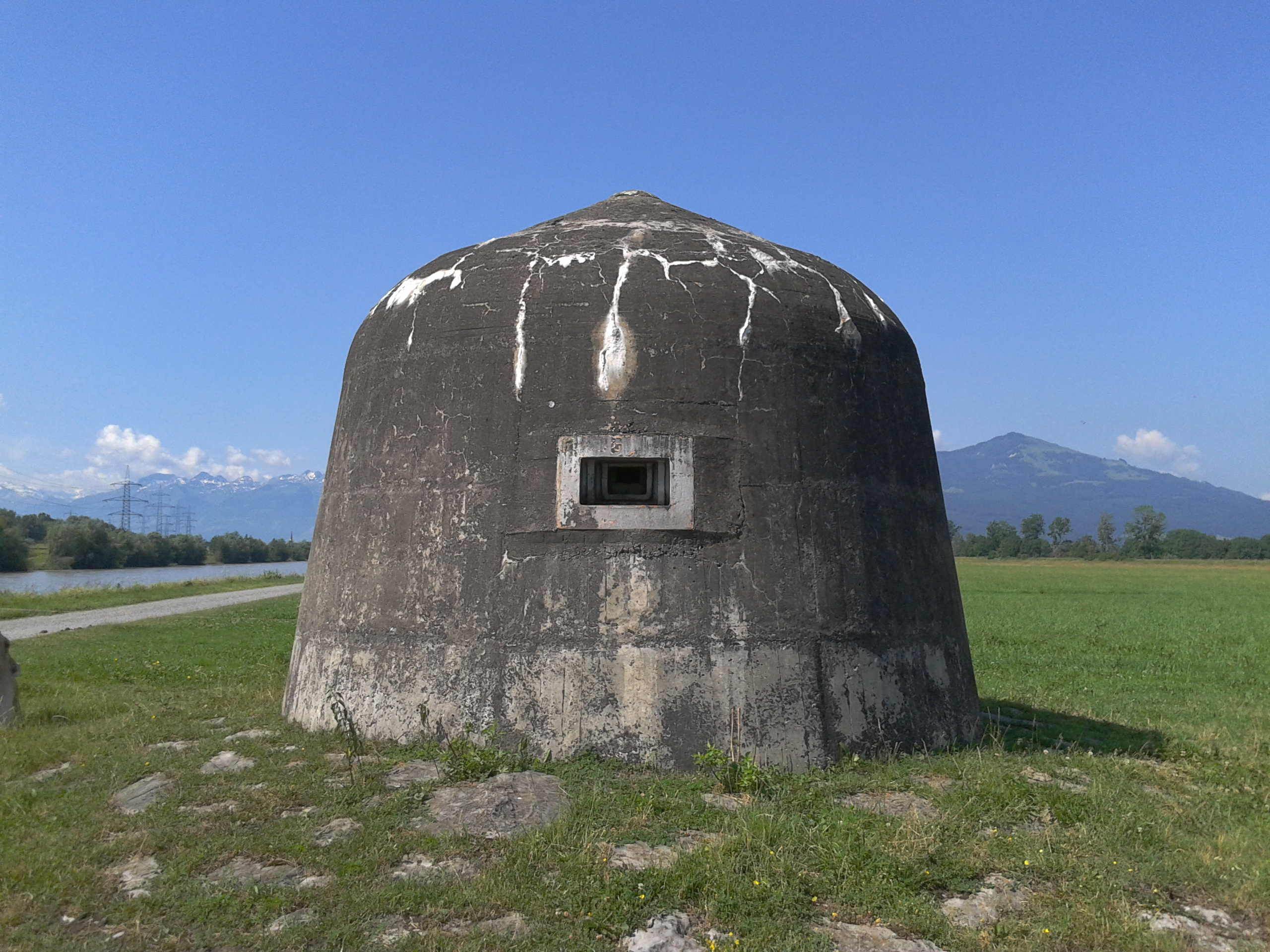 Grenzübergang Kriessern (CH) - Mäder (A). Bunker aus der Zeit WK-II zum Schutz der schweizerischen Grenze am Rhein - kuppelförmiger Leichtstand in Betonbunkerausführung mit Maschinengewehren (Schussrichtung längs des Rheines - nicht nach Österreich!). Fotografiert in der Schweiz im Überflutungsgebiet des Rheins mit Blickrichtung flussaufwärts.